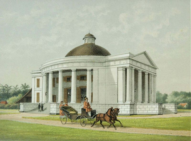 Litho. Litho naar een oorspronkelijke aquarel van J. Rappard.. De Willemskerk in Batavia